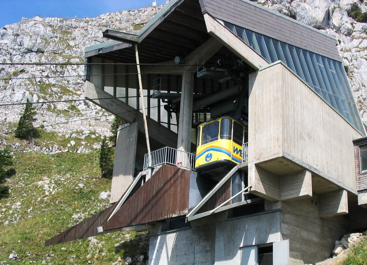 Biergstatioun vun der Wendelsteinseelbunn